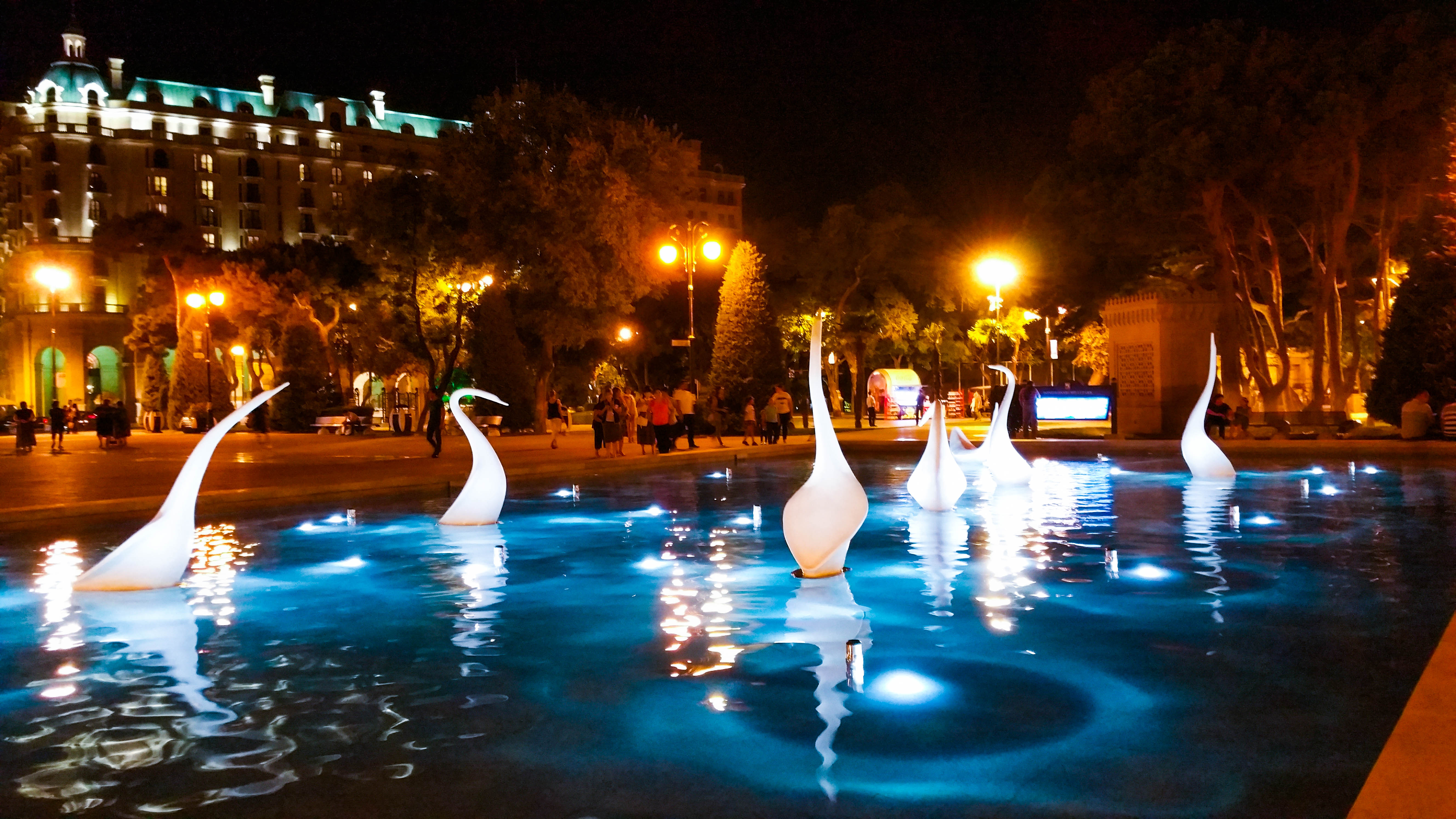 Bakıda Qu quşları fontanı